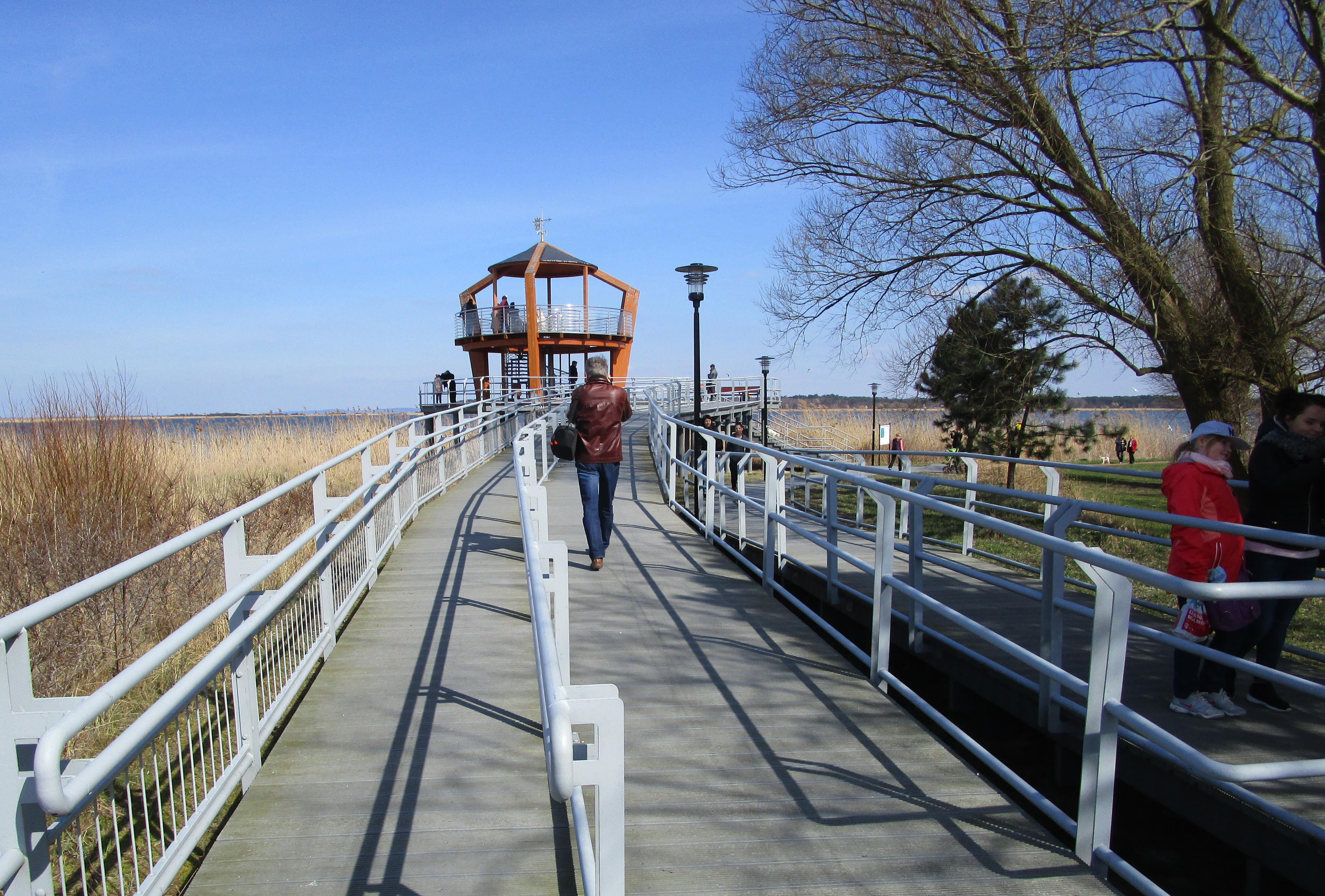 Aussichtsplattform an der Promenade Neuwarp (Landkreis Pölitz, Woiwodschaft Westpommern, Polen).